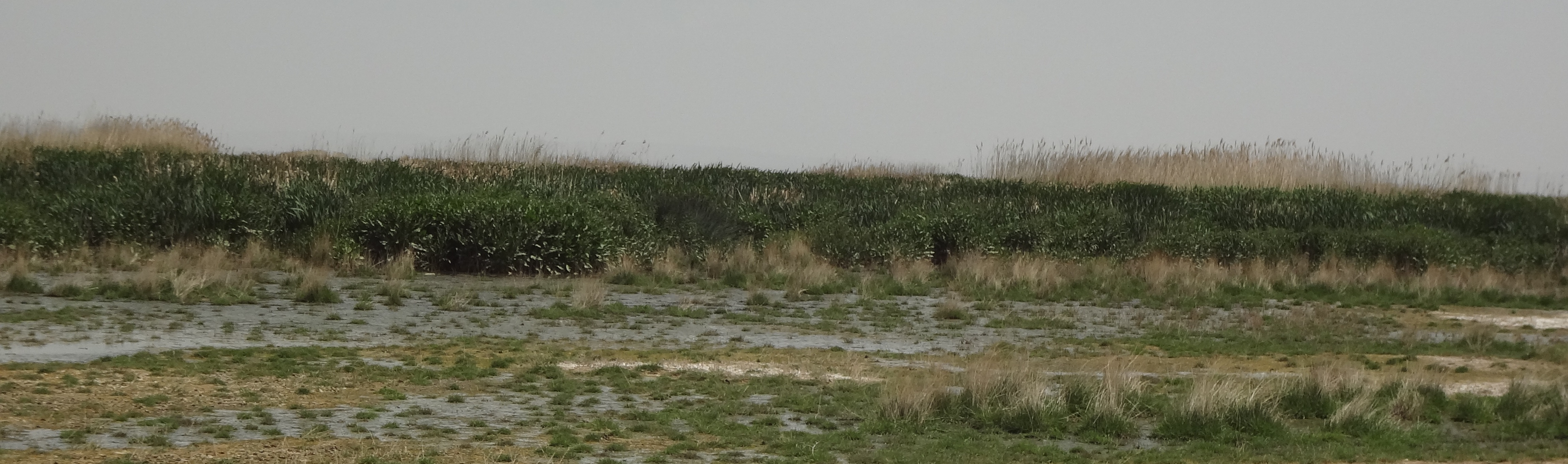 مرداب ایجاد شده در اثر ورود تصویه فاضلاب اراک به تالاب میقان